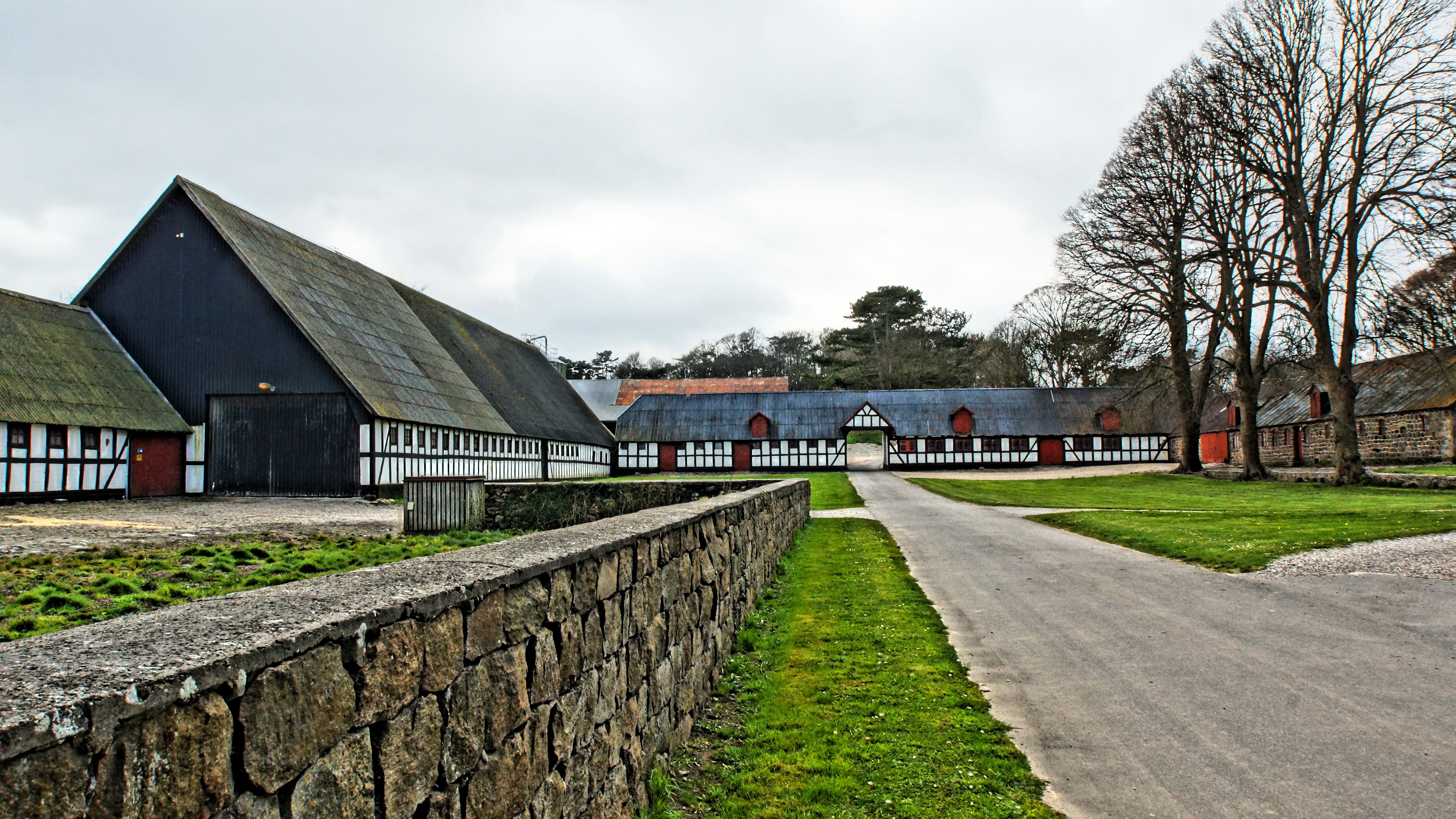 Isgård, staldbygninger